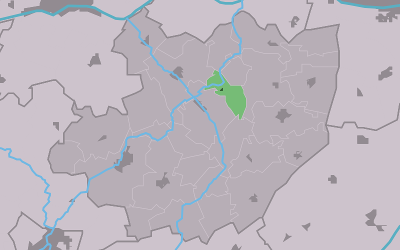 Kaartsje fan himrik fan Baard